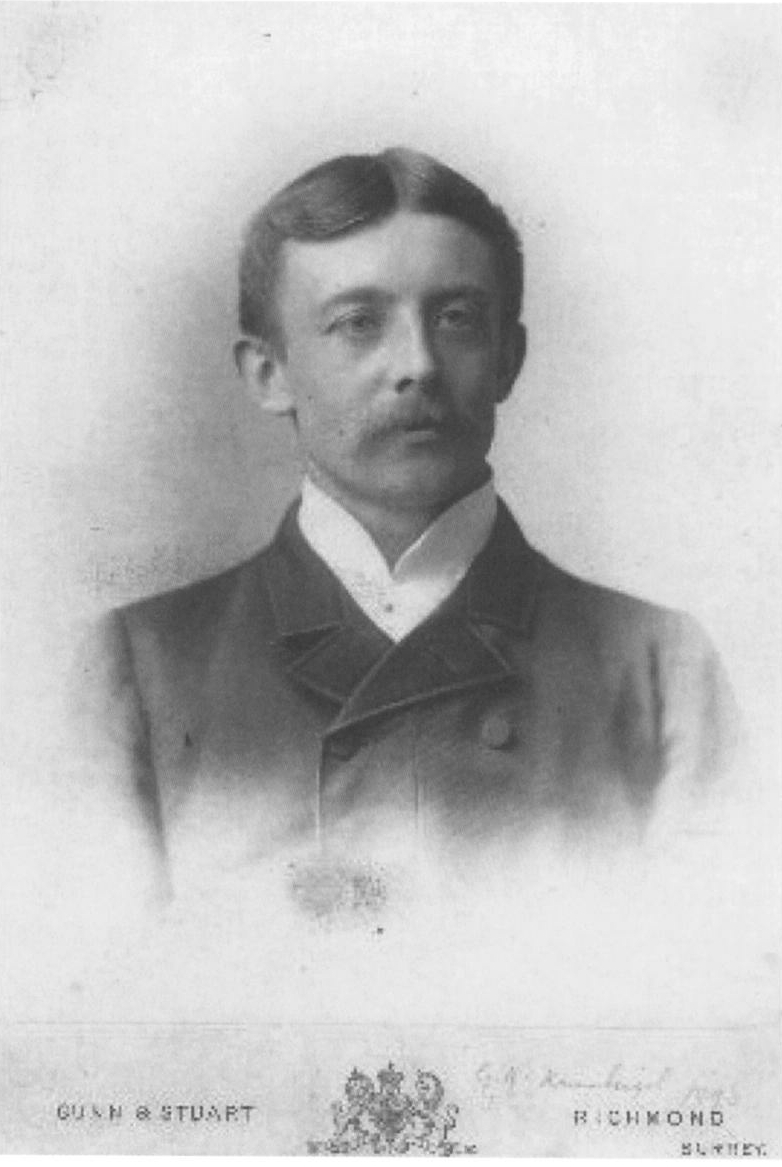 Carte de visite of Gustav Krumbiegel